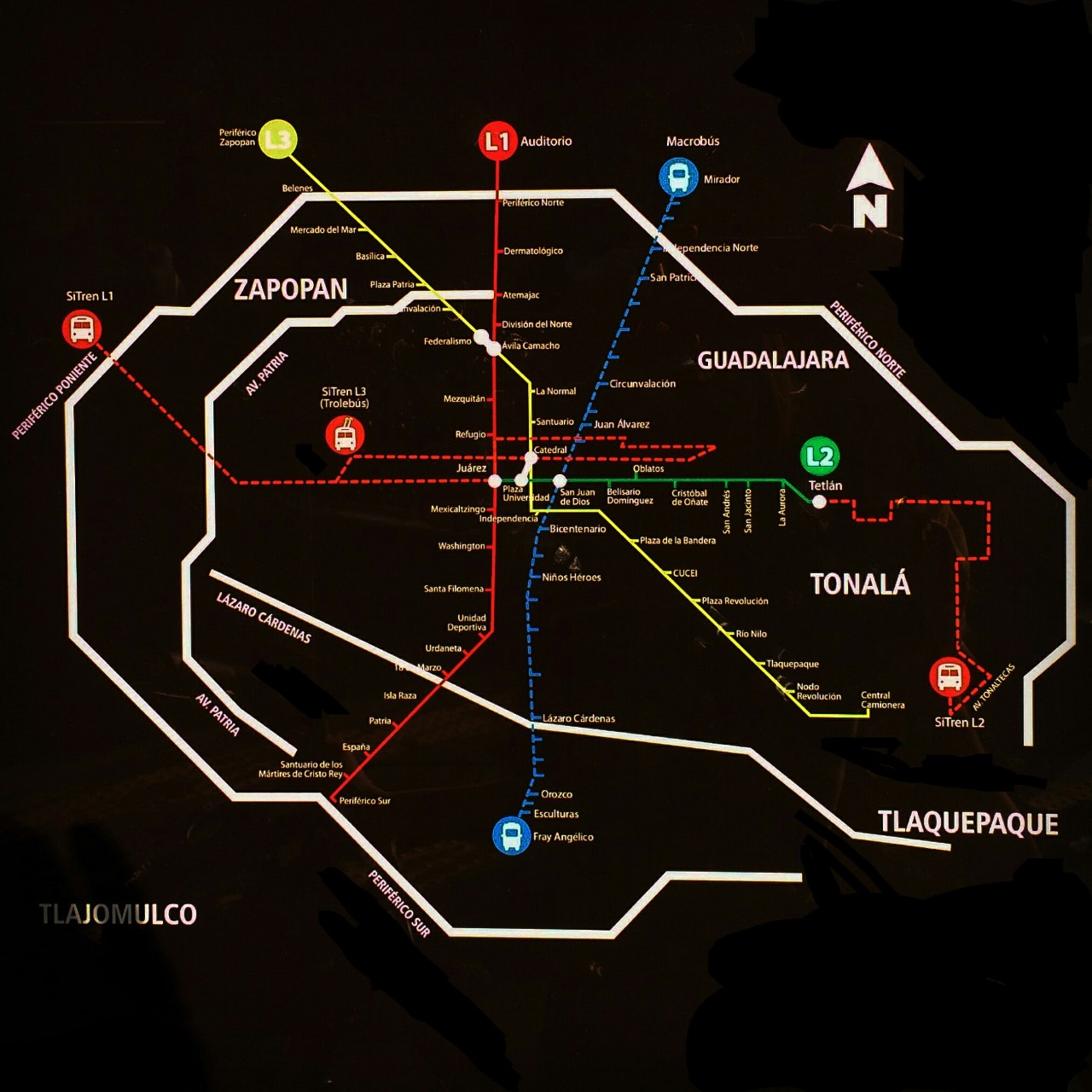 Foto del mapa de guía ubicado en la estación Juárez del Tren Ligero donde se observan los diversos sistemas públicos de transporte.